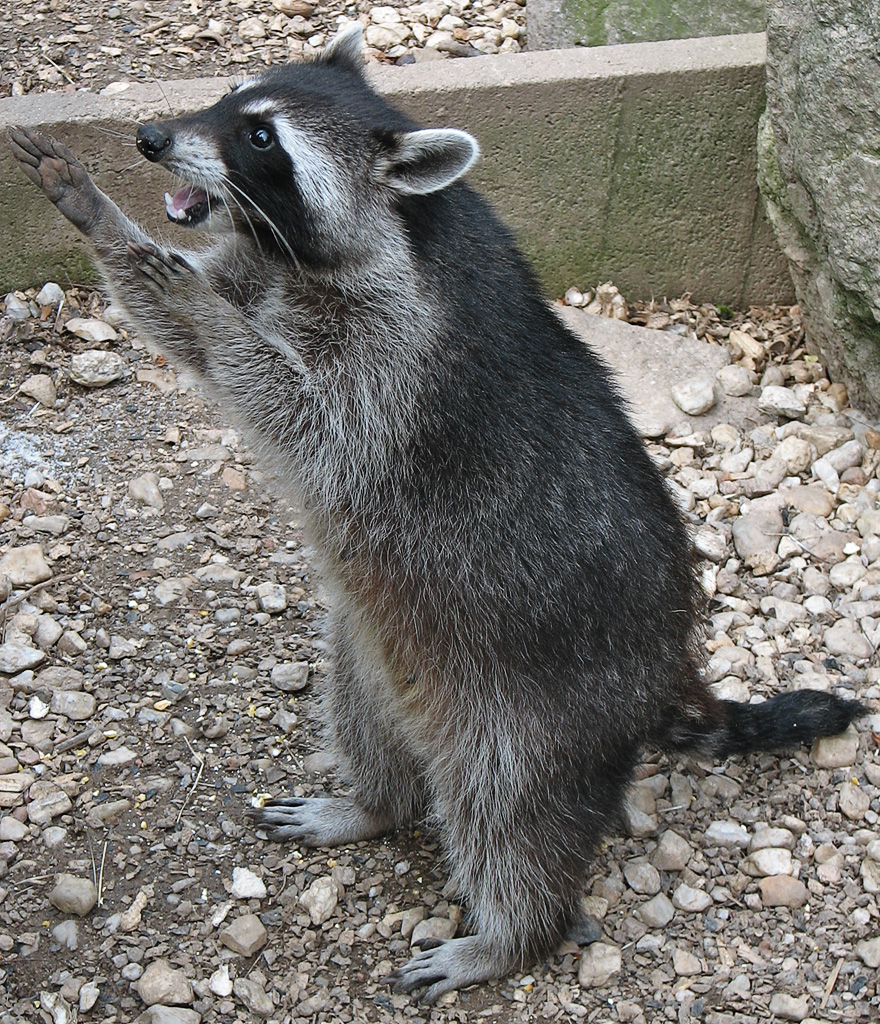 Beschreibung: Nordamerikanische Waschbär (Procyon lotor) / raccoon Fotograf: Darkone, 5. August 2005